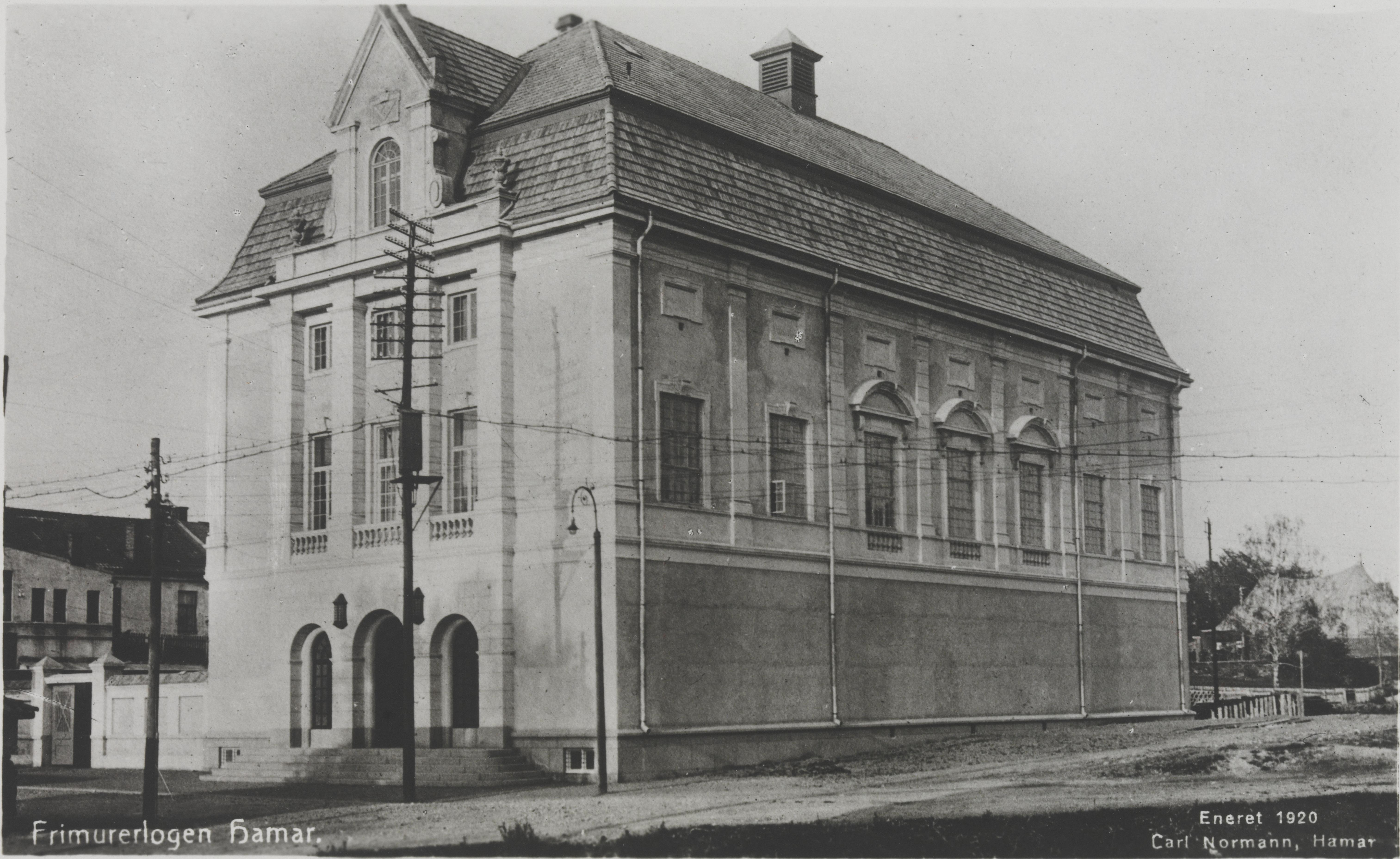 Bildet er hentet fra Nasjonalbibliotekets bildesamling Østre gate, Hamar, Hedmark